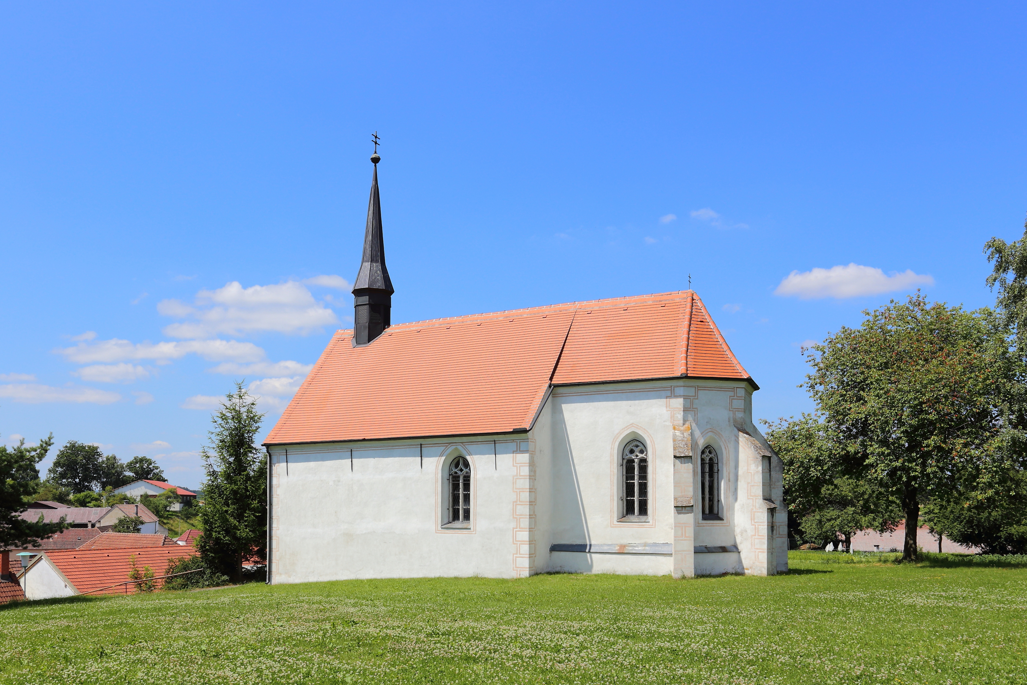 Katholische Filialkirche hl. Leopold in Wappoltenreith, ein Ortsteil der niederösterreichischen Gemeinde Irnfritz-Messern. Die spätbarocke Saalkirche mit einem Westturm wurde erhöht am Nordrand des Ortes errichtet.